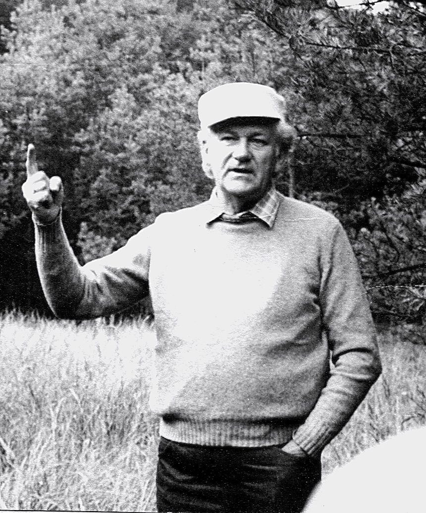 Prof. Kurt Ruchholz, Professor für Allgemeine und Regionale Geologie der Ernst-Moritz-Arndt-Universität Greifswald während einer Exkursion in Vorpommern 1988